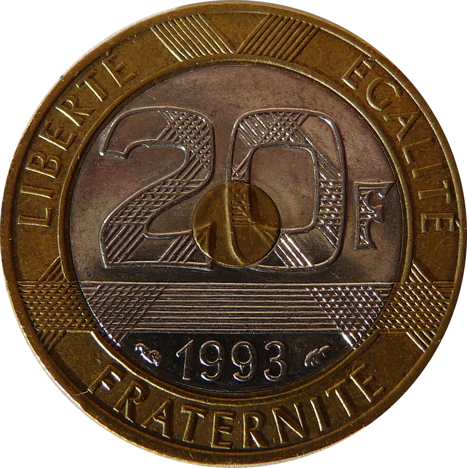 20 francs de 1993